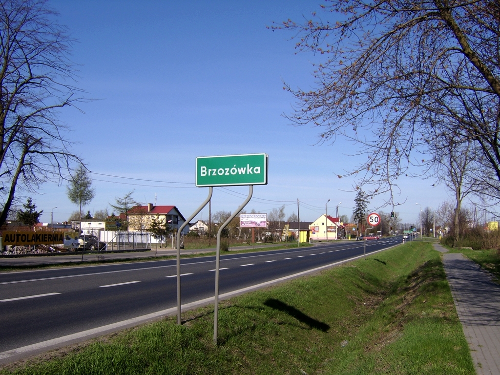 Wieś Brzozówka